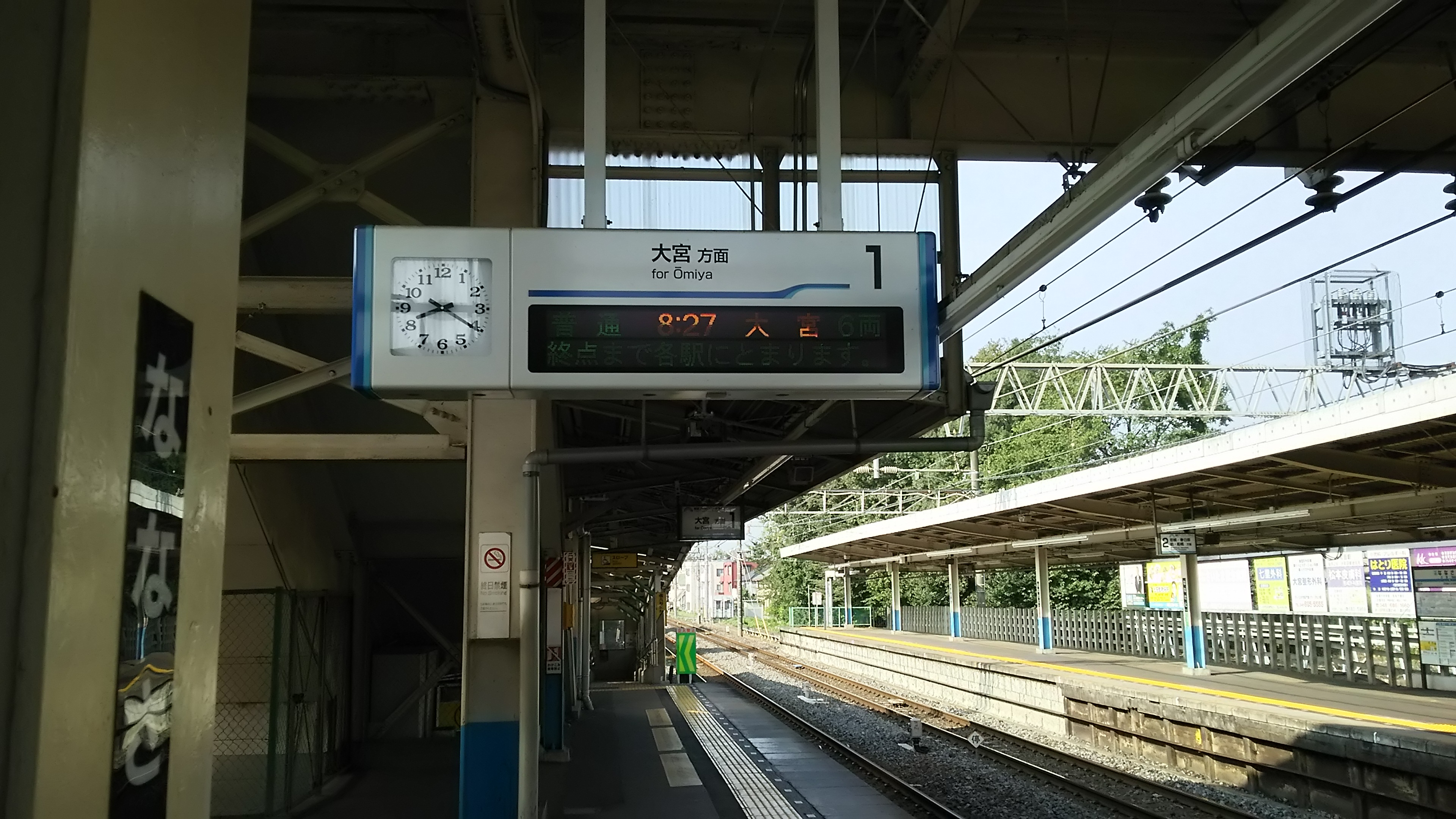 七里駅 発車案内標（１番線）